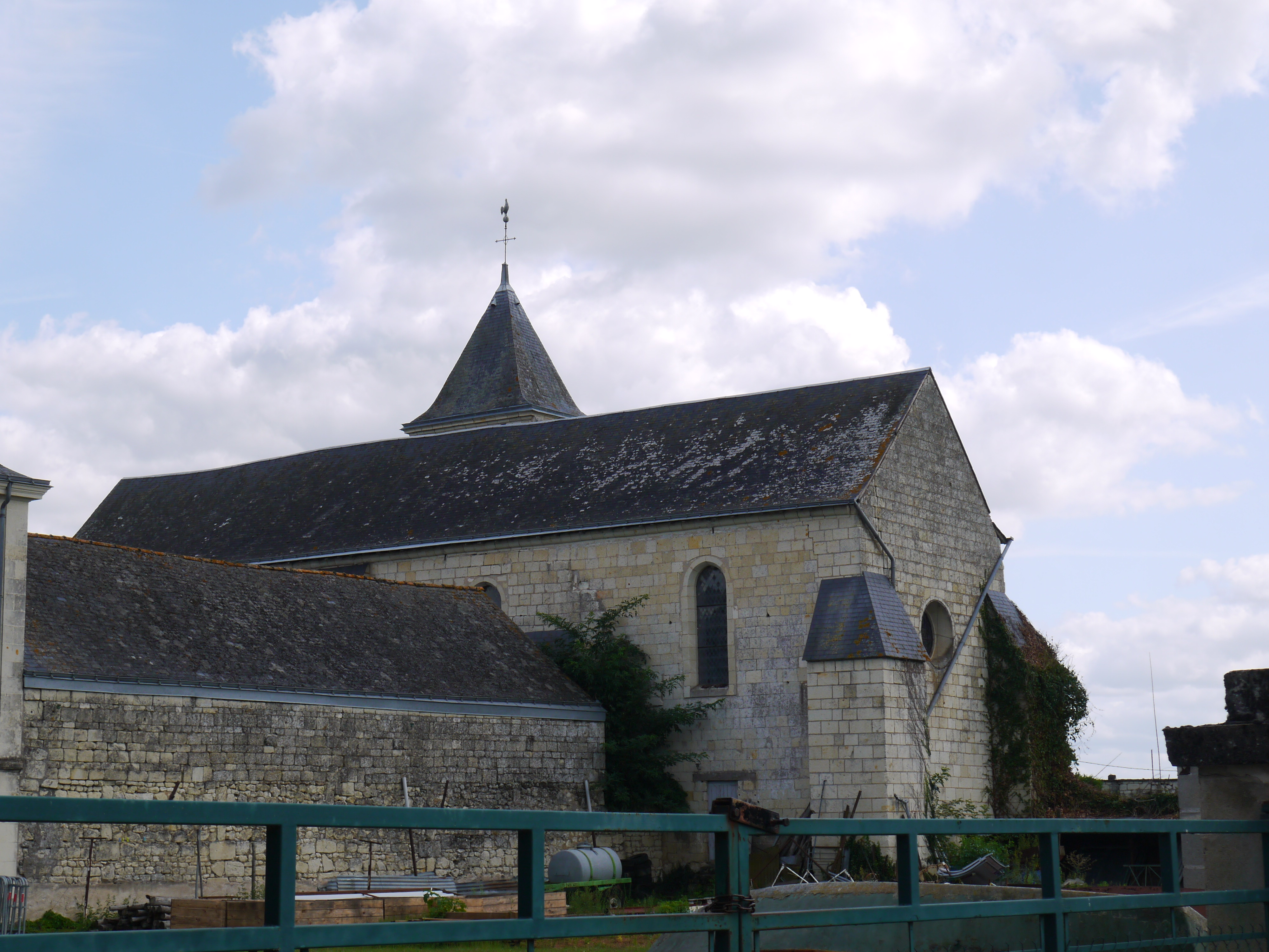 L'église Saint-Pierre.